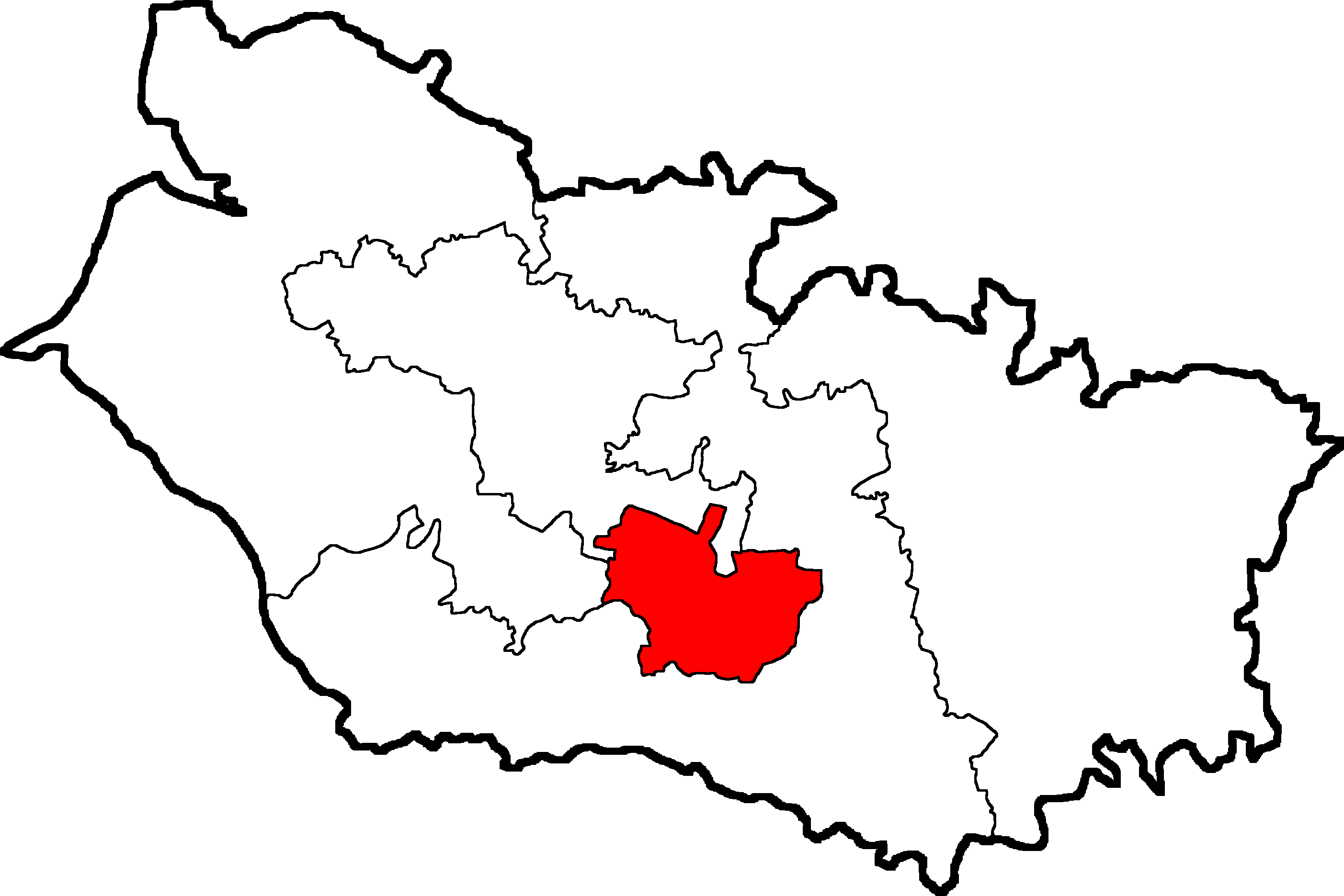 Deuxième circonscription de la Somme deepuis 2012